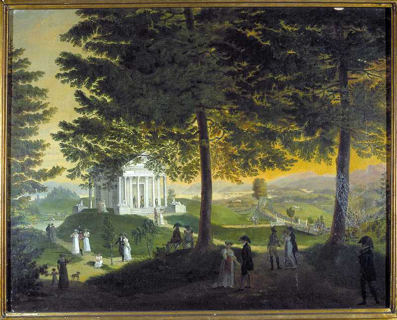 Motivet viser haveselskap på Ullevål. I forgrunnen spaserende par offiserer og embetsmenn i uniform kvinner i empiredrakter. I mellomgrunnen lysthus i form av gresk tempel. Sign/påskrift: på papir-lapp bak på bildet: Norges Jubileumsutstilling 1914. eier A. Collett""